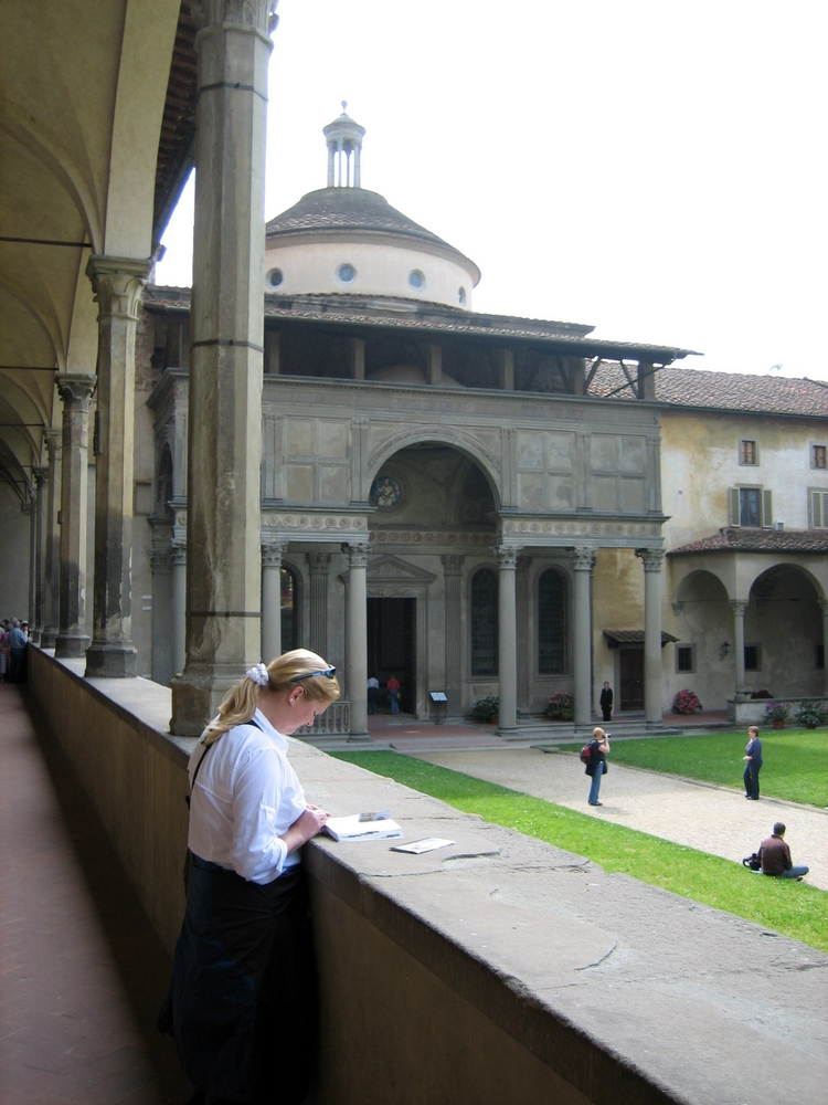 SAnta Croce, Firenze,Toscana, Italia